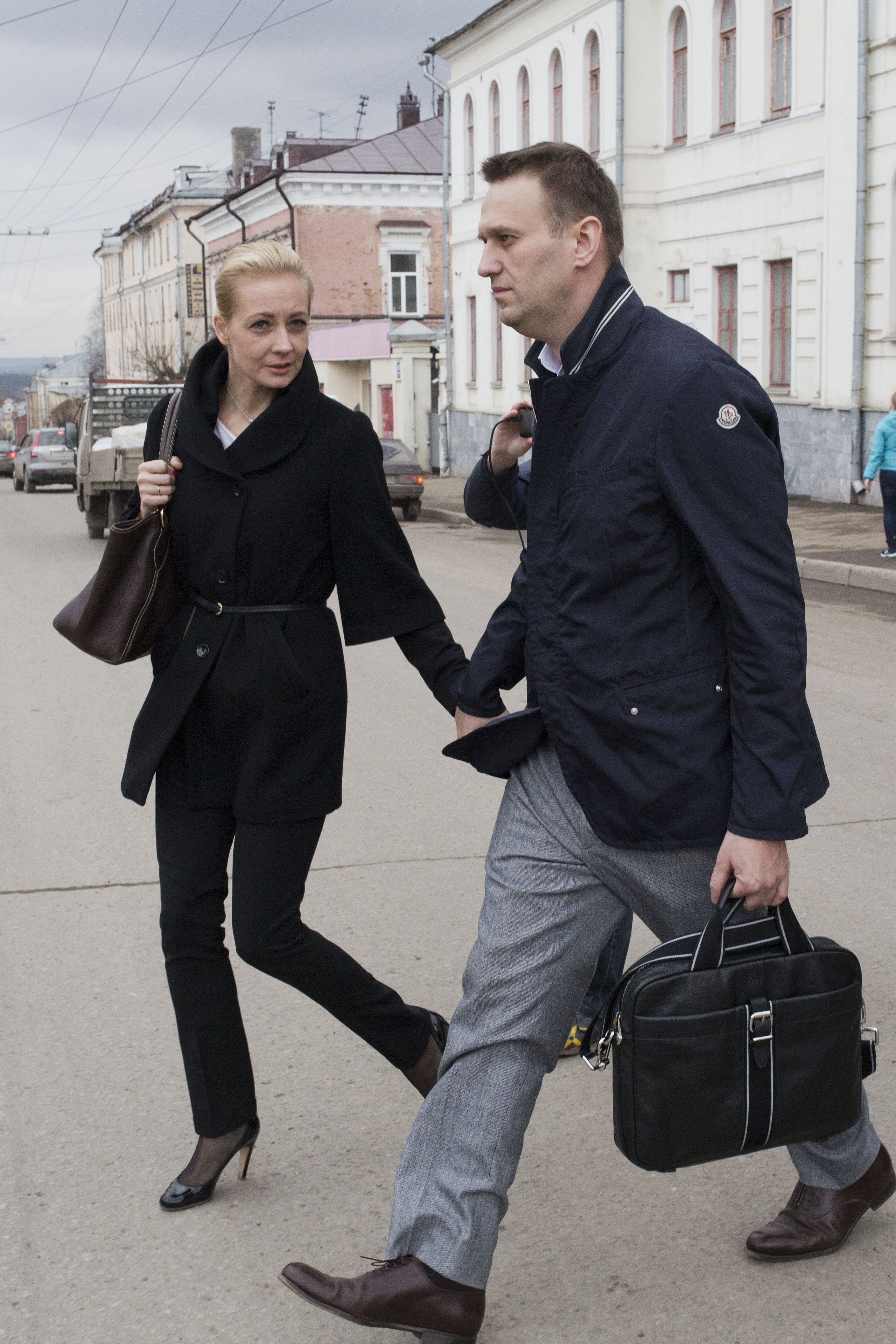 Алексей и Юлия Навальные после одного из заседаний суда